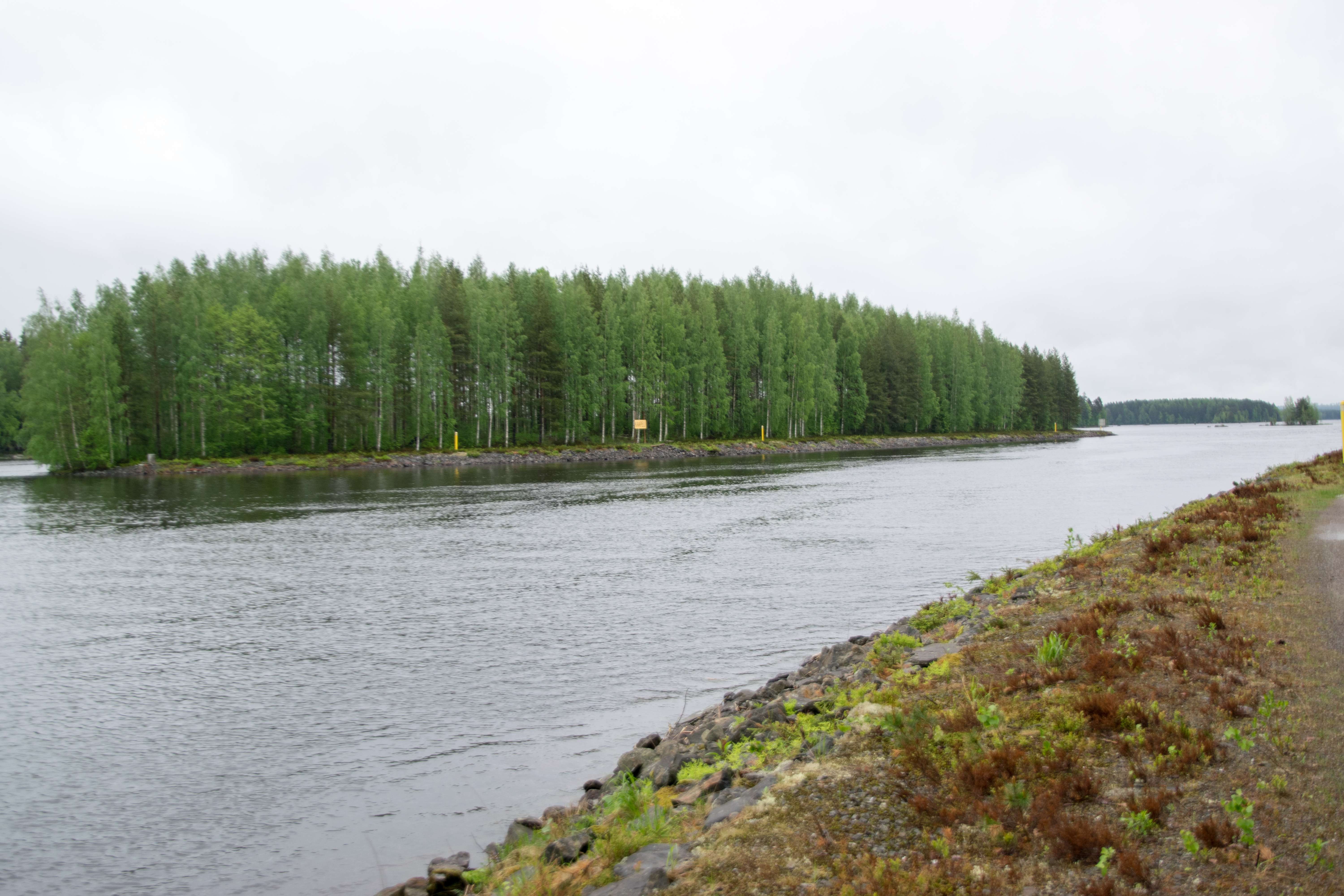 Rahasalmen kanava